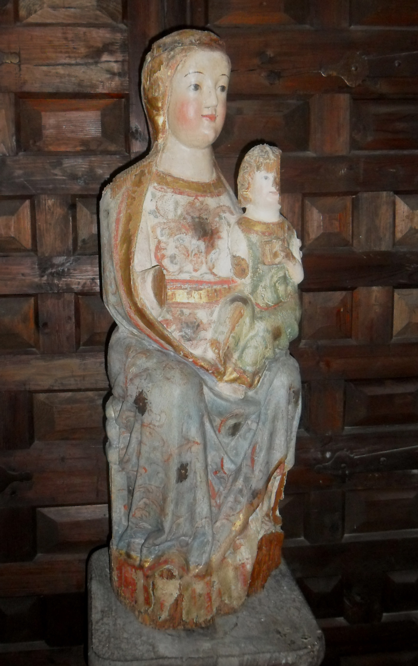 Nª Sª de San Juan (1300) Talla Gótica de Santibáñez de Valcorba Museo Diocesano y Catedralicio Valladolid